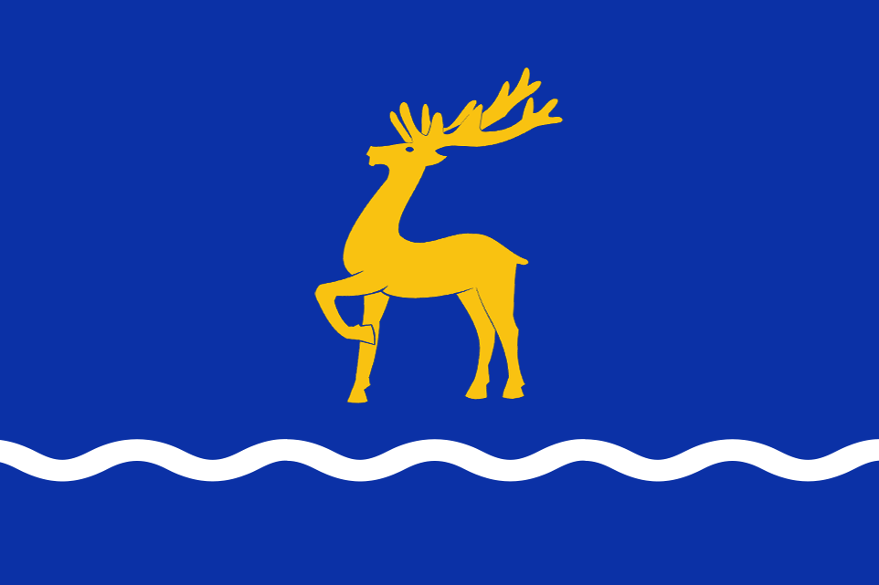 Сучасний прапор міста Бережани Тернопільської області